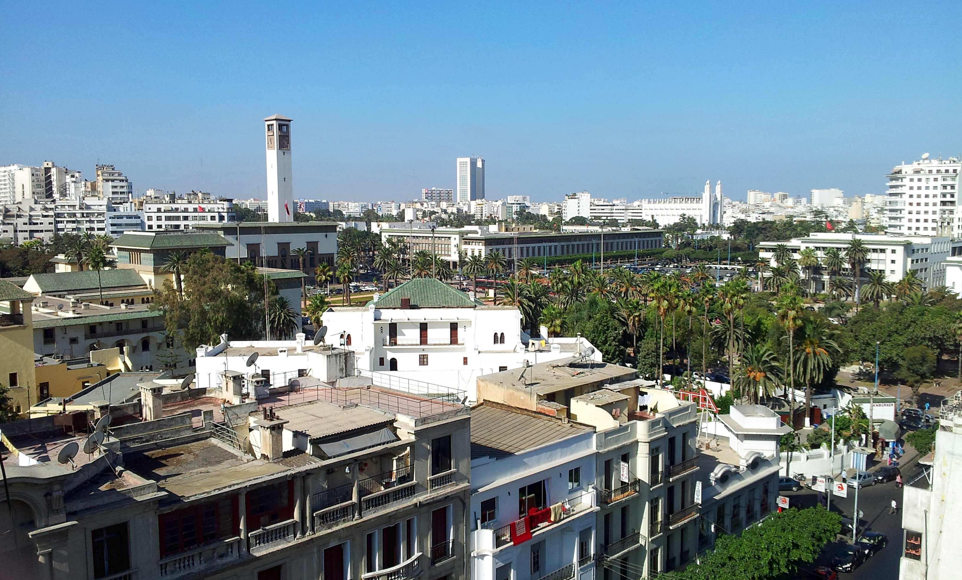 В центре Касабланки.